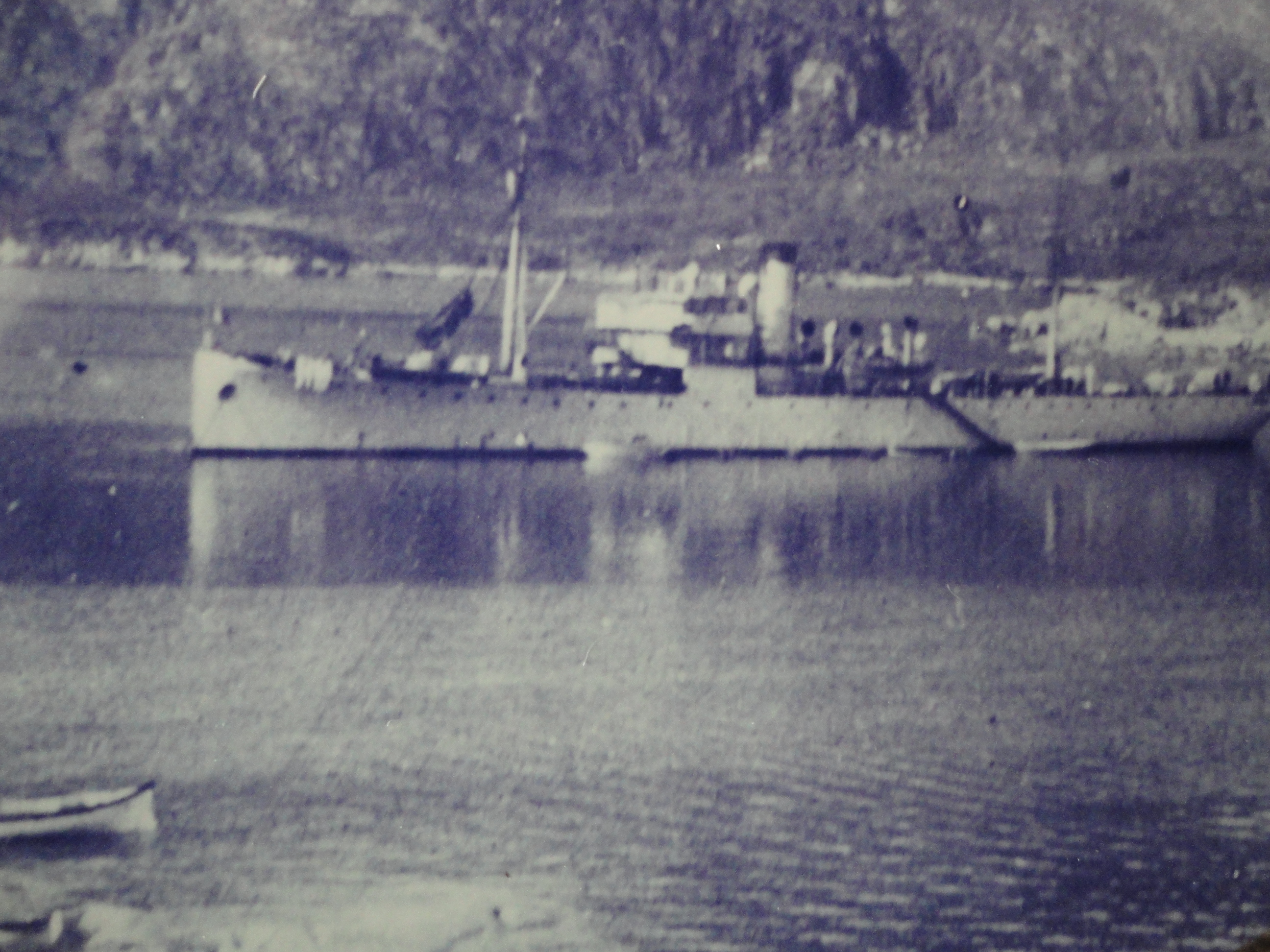 Aviso Ville d'ys commandé par le capitaine de Vaisseau Pierre Goybet de 1933 à 1935. Missions d'assistance au profit de la flottille de pèche au large de Terre-Neuve , du Labrador et du Groenland. Photo originale prise à Terre-Neuve sous le commandement de Pierre Goybet reproduite par son petit fils Henri Goybet